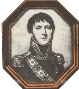 Général_Paul_Charles_François_Adrien_Henri_Dieudonné_Thiébault